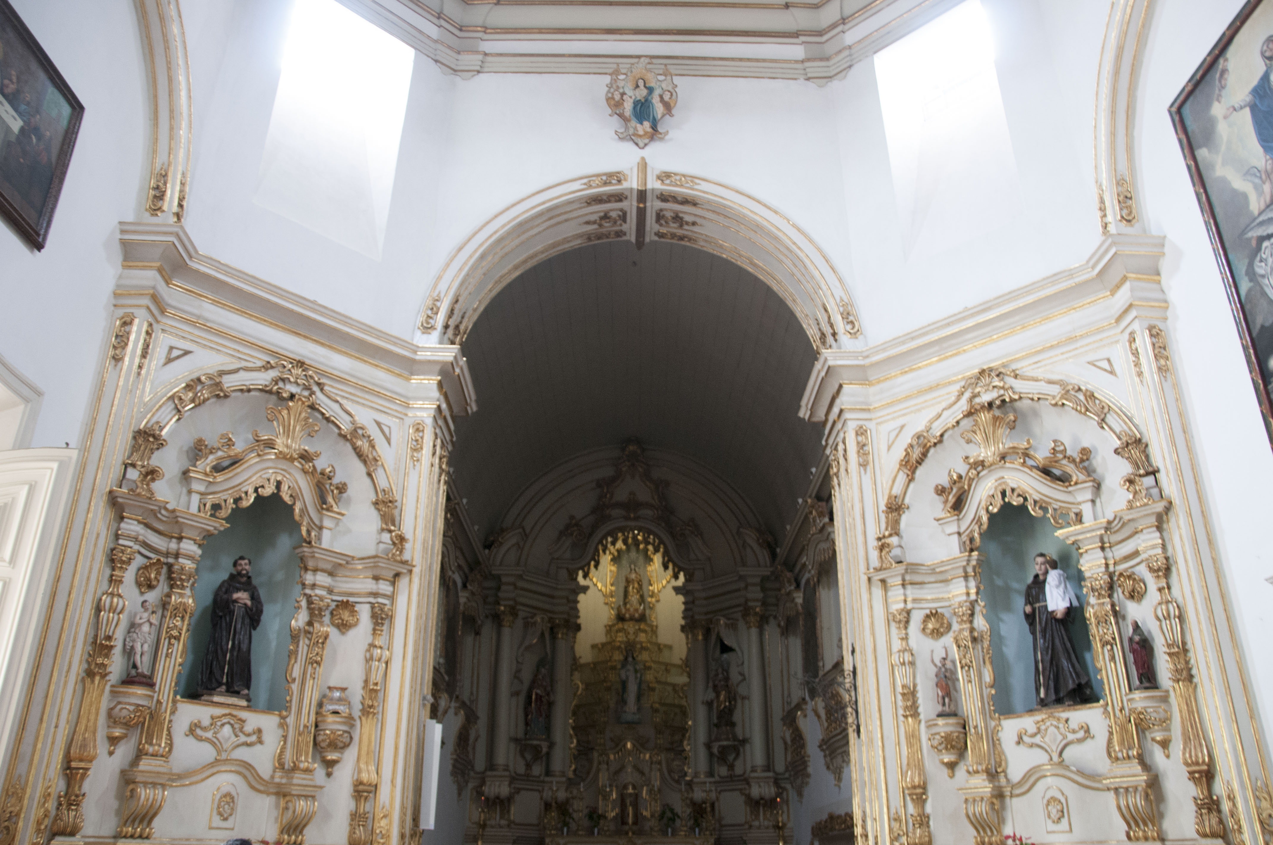 Altar principal da capela do Mosteiro da Luz